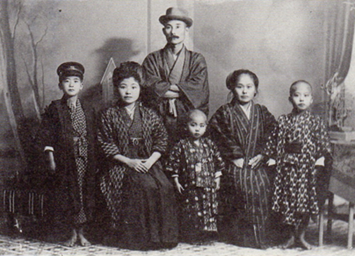 後列中央・親泊朝擢、前列向かって左から長男朝省、長女ツル、三男朝圭、妻ウシ、次男朝普